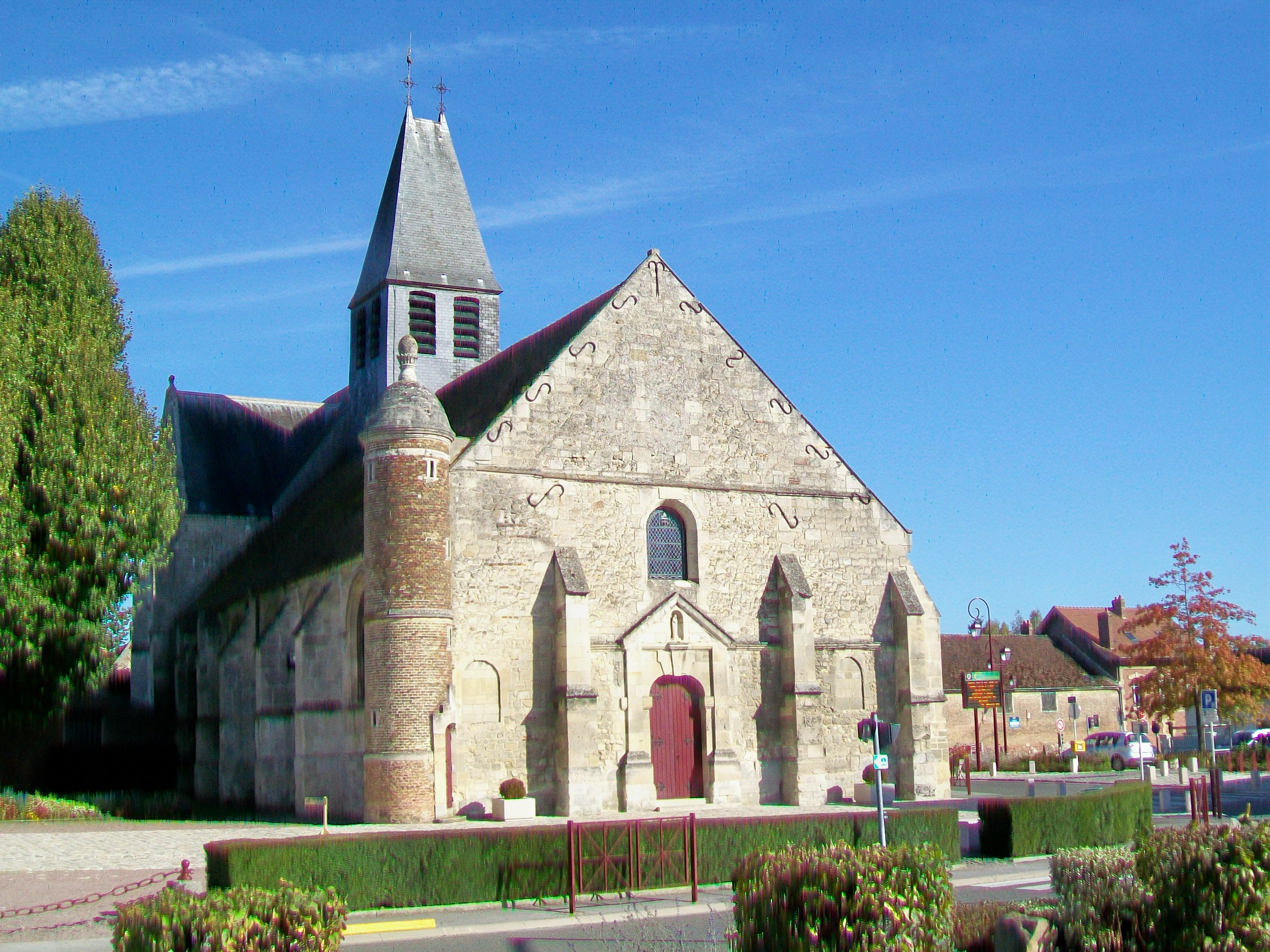 La façade occidentale sur la place René Langlois-Meurinne.